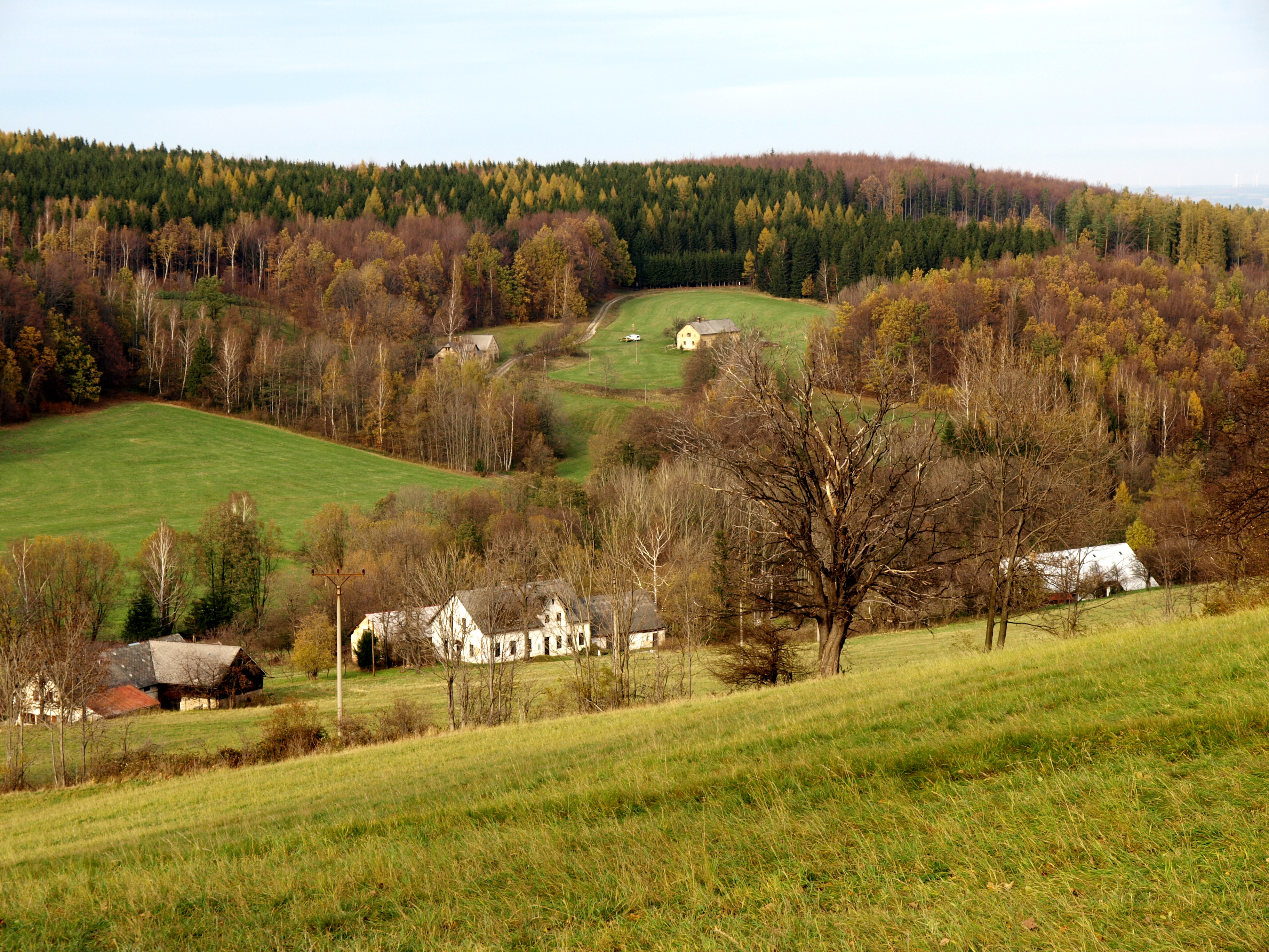 osada Červený Důl